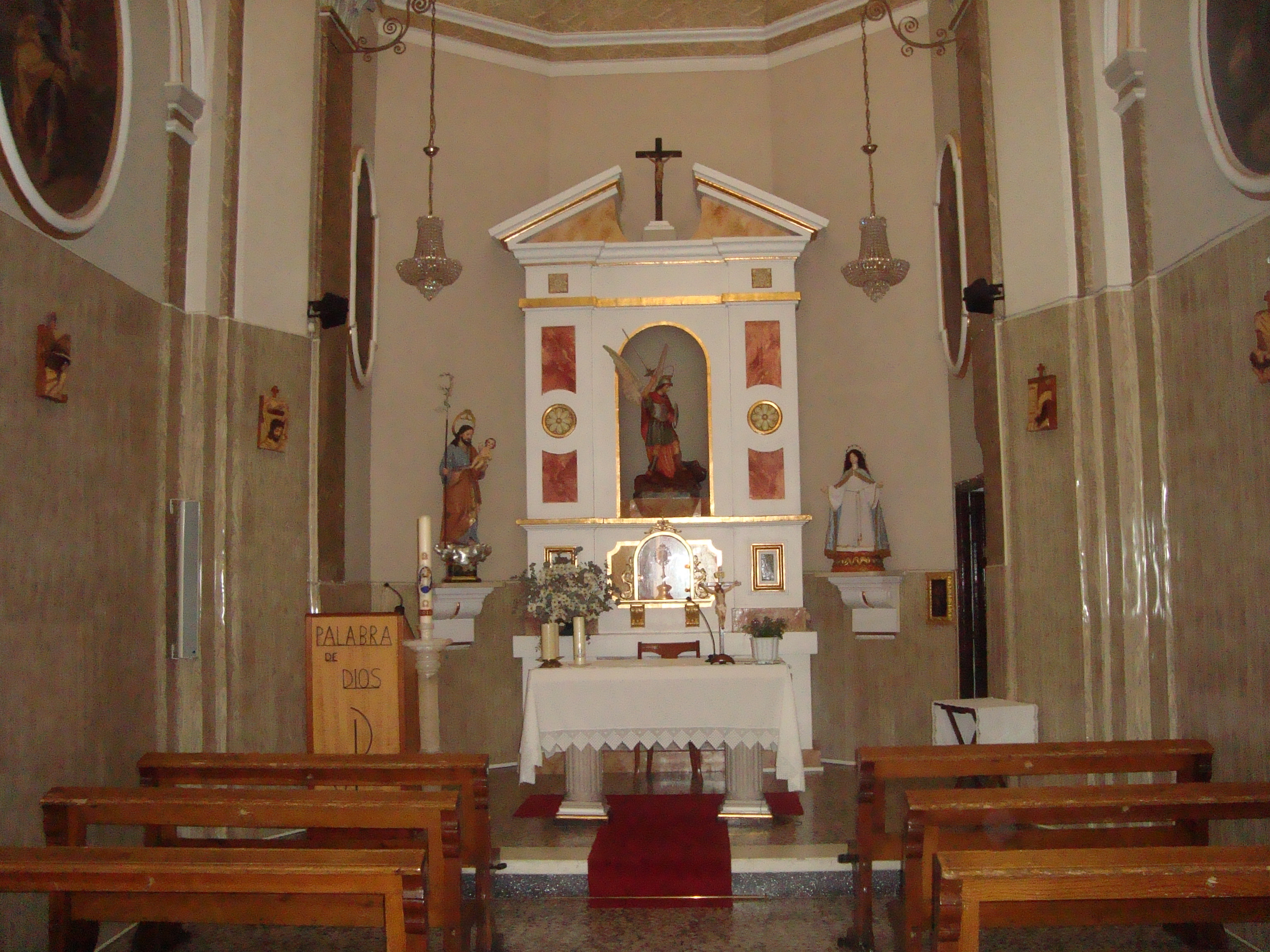 Església de Sant Miquel (l'Alcora) 04.005-008.